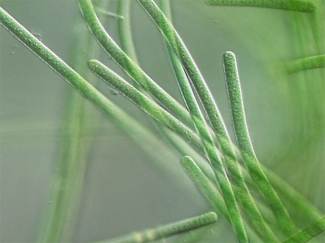 Oscillatoria sp. / Microscope:Leica DMRD (DIC)